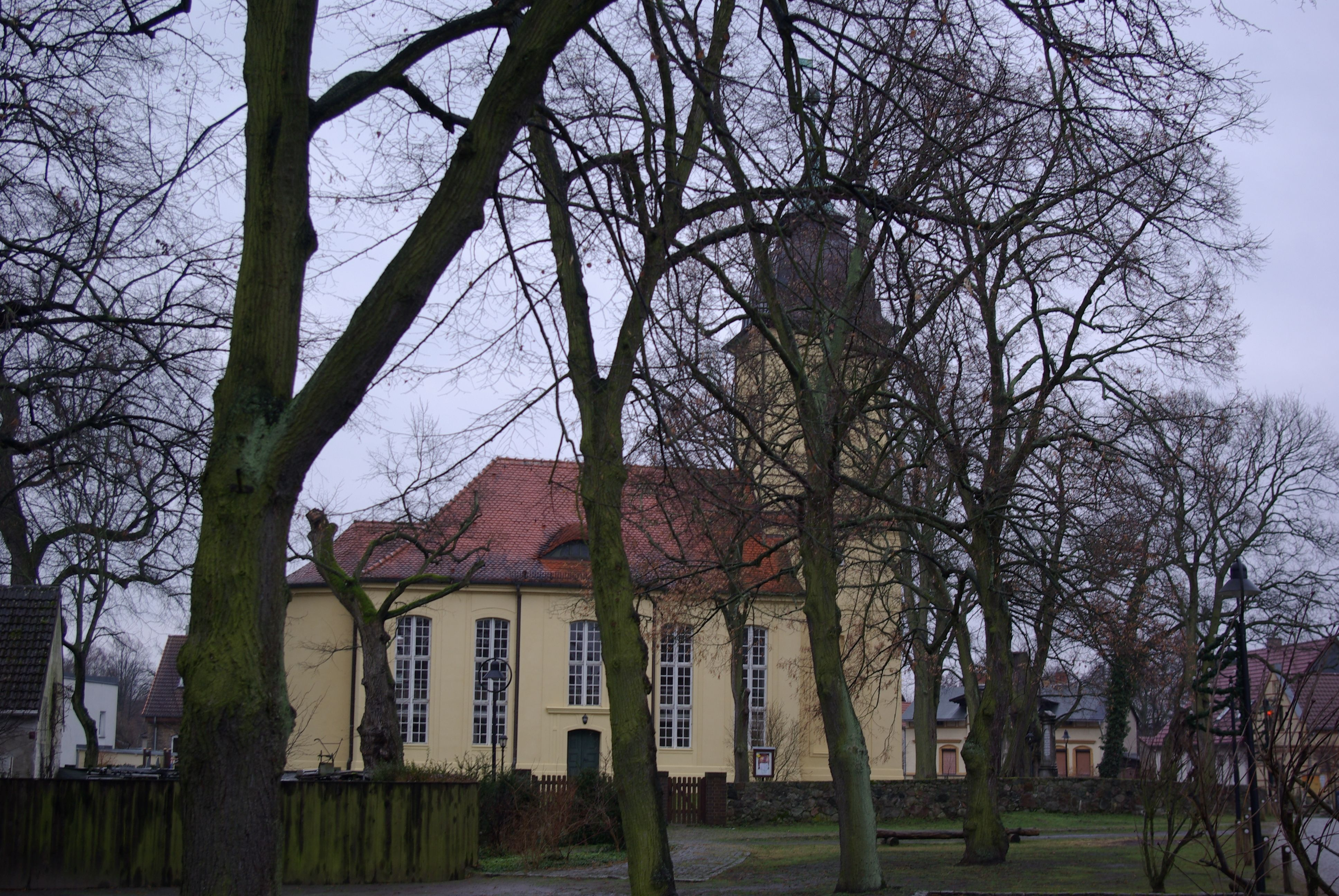 Mittenwalde Ortsteil Motzen in Brandenburg. Die Kirche steht unter Denkmalschutz.